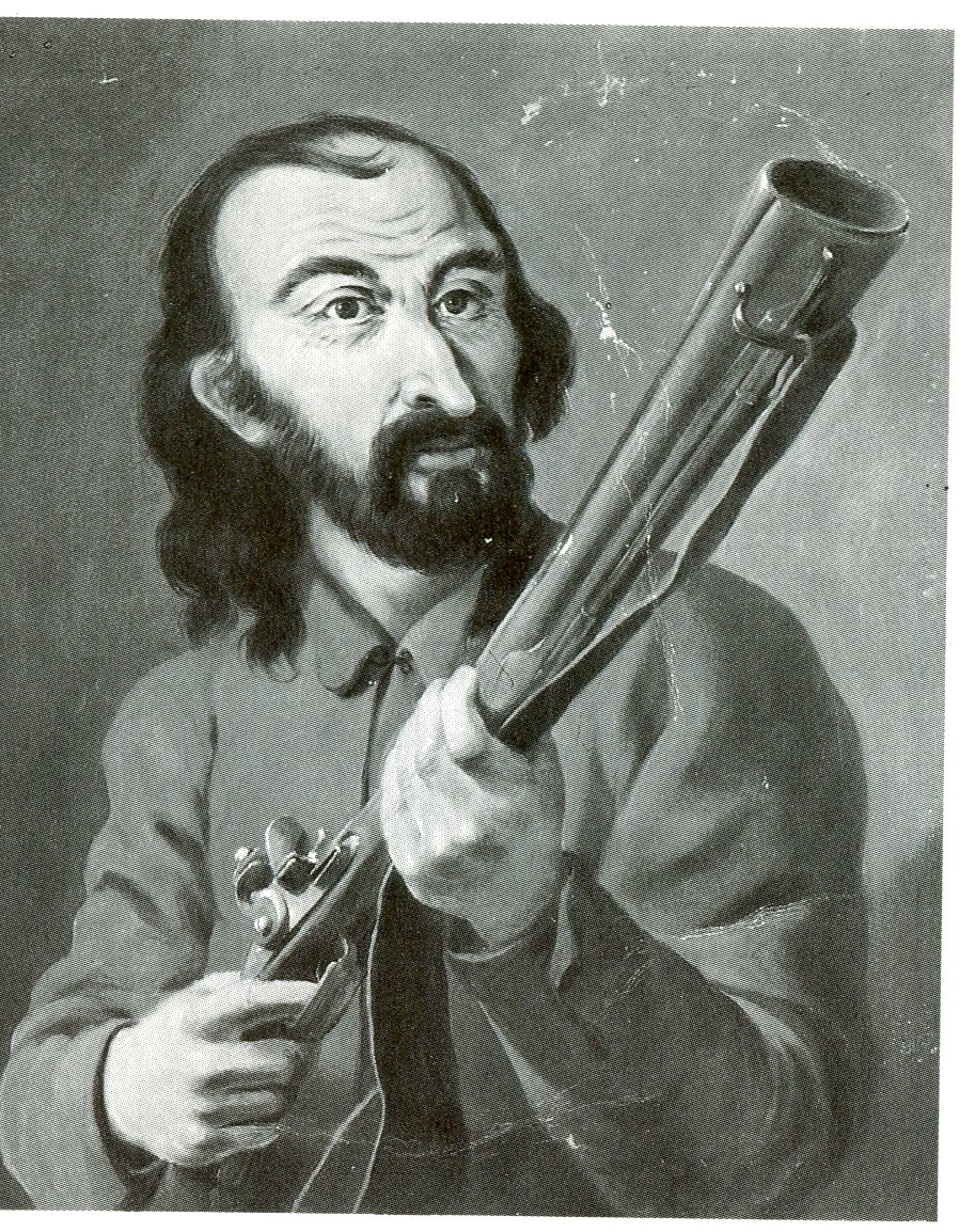 Jacob Reinhard vulgo Hannikel Öl auf Papier Raststatt, Wehrgeschichtliches Museum